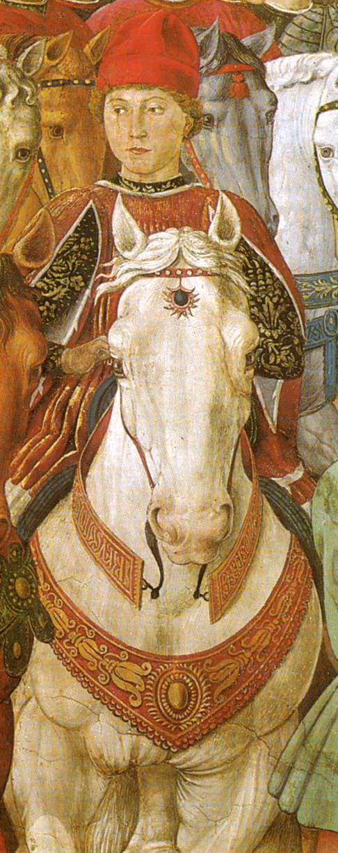 Galeazzo Maria Sforza. Detail from the fresco in the "Cappella dei Magi", at Palazzo Medici Riccardi in Florence, Italy.